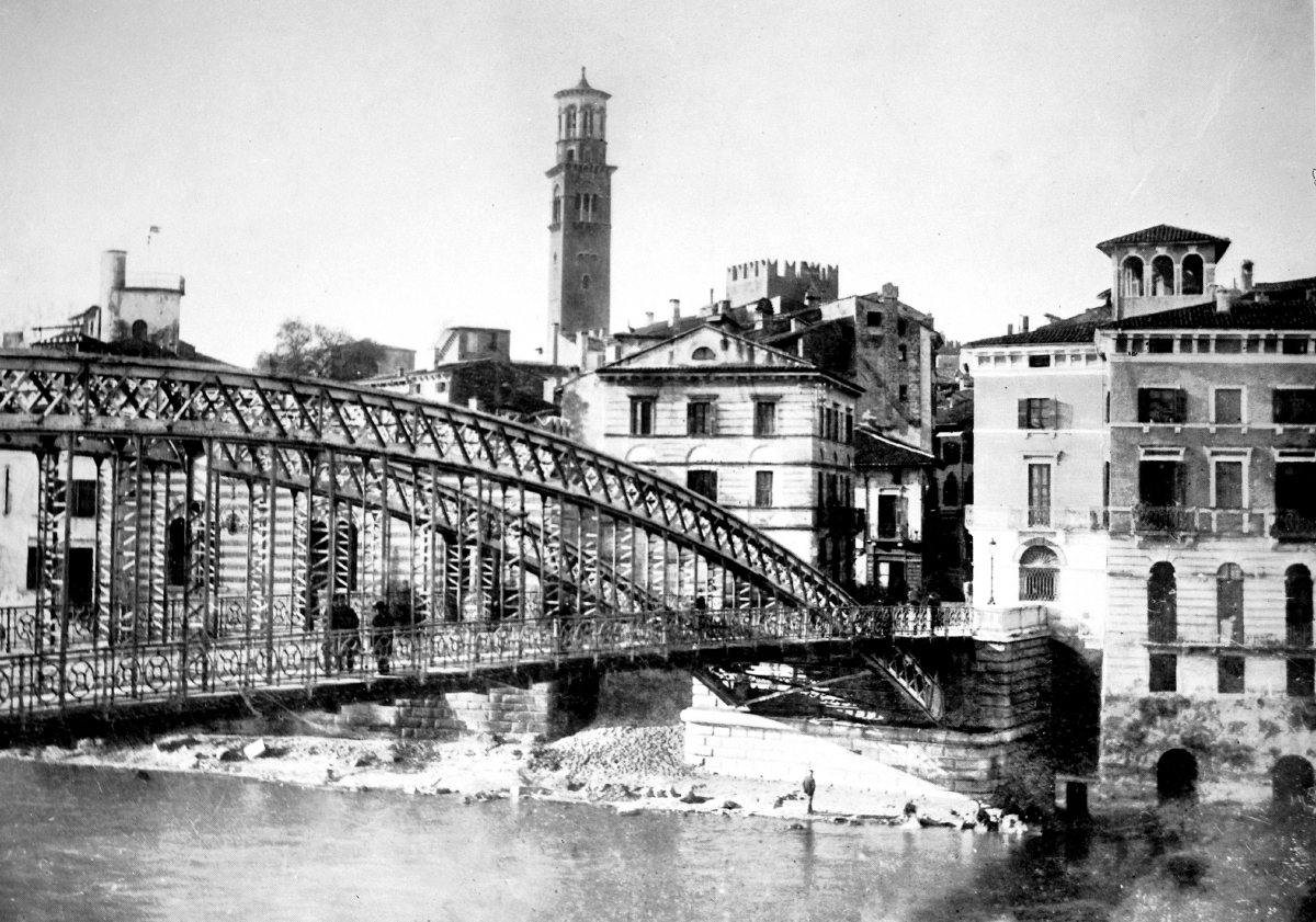 Il ponte nella versione 1884 - 1894